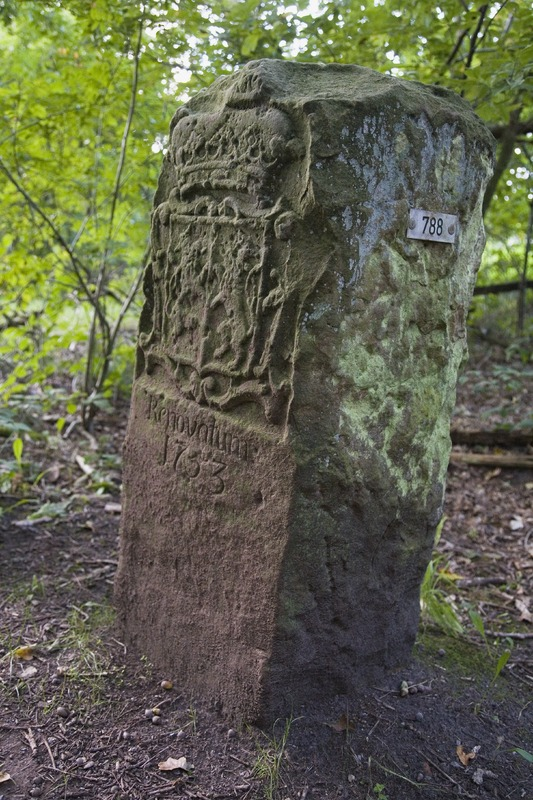 Grenspaal met het wapen van Gelre in Ratum, gemeente Winterswijk.